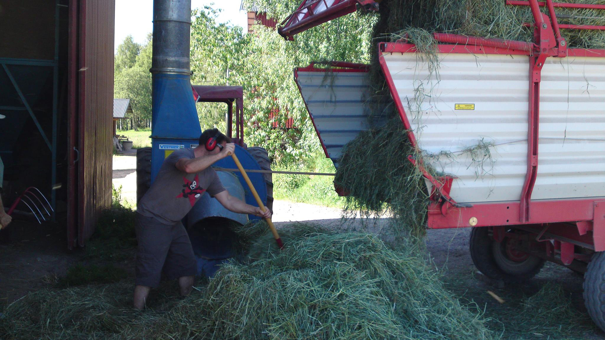 Matning av en höejektor.